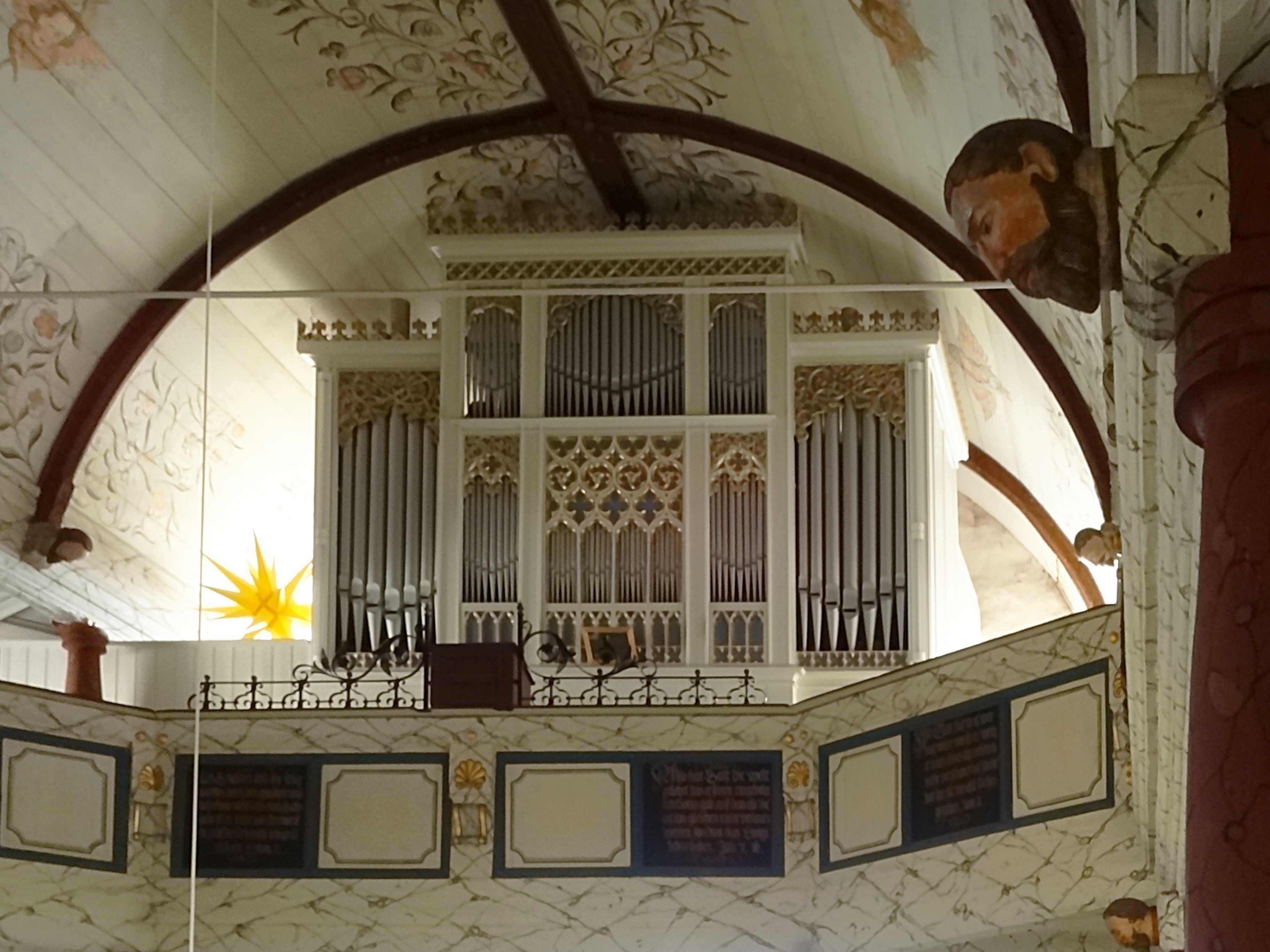 Orgel von Michael und Wilhelm Holland aus Schmiedefeld (1851 und 1866 Umbau; 2 Manuale, 25 Register) in St. Bartholomäus (Themar) [1]